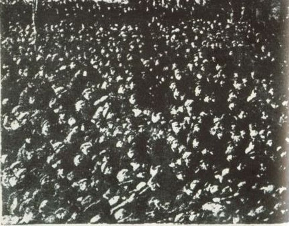 Транспортна стачка